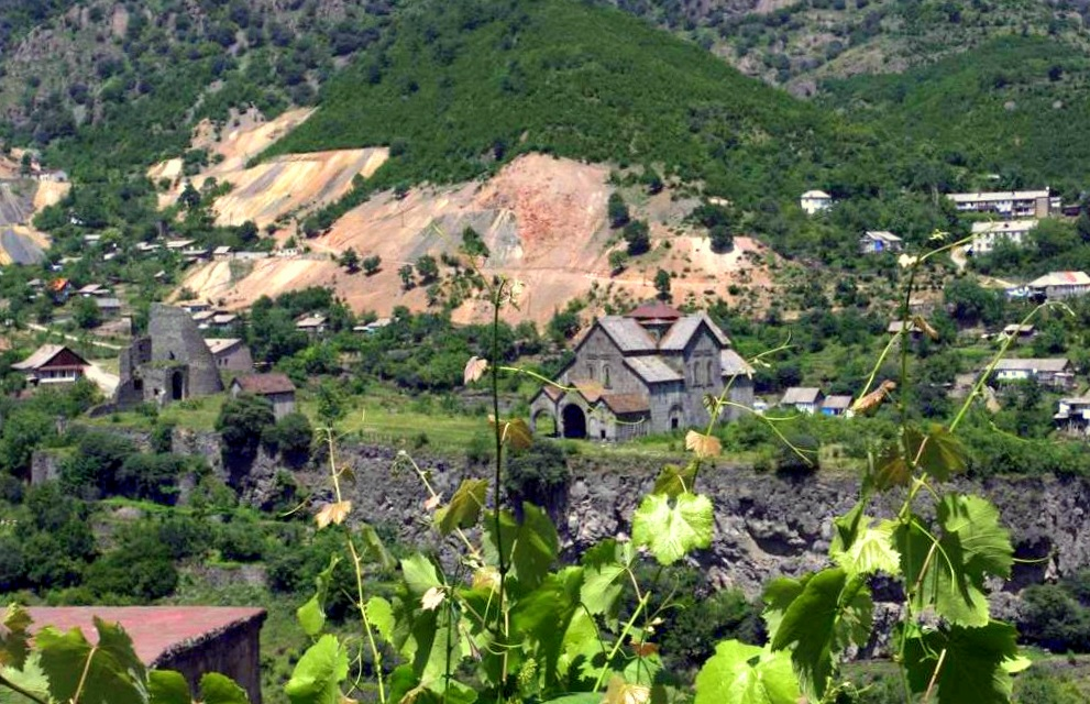 Akhtala, Armenia